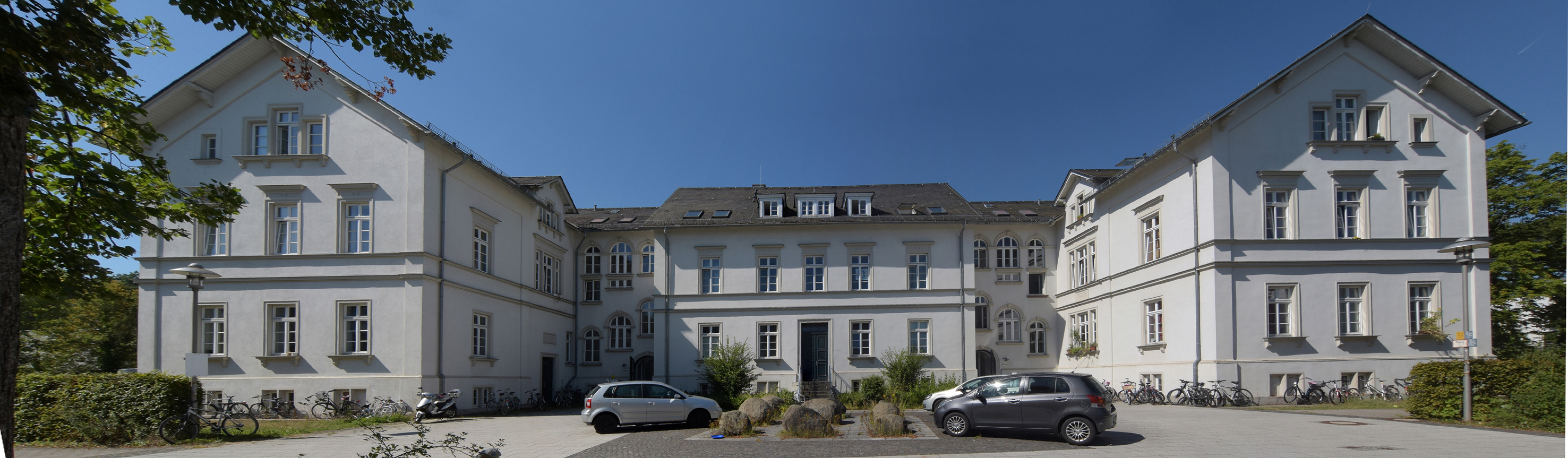 Darmstadt- sog. ehem. Idiotenanstalt, danach Polizeipräsidium, jetzt Studentenwohnheim, fotografiert für Liste der Kulturdenkmäler in Darmstadt